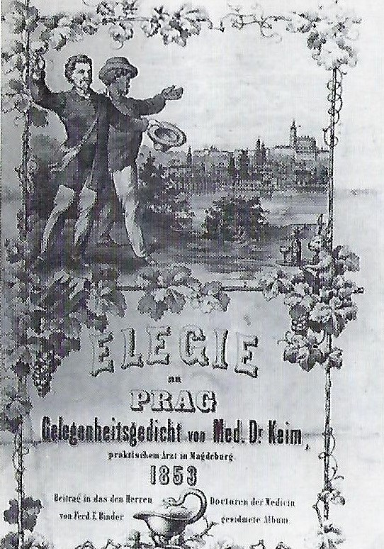 Umschlagblatt der Elegie an Prag von Karl Julius Keim